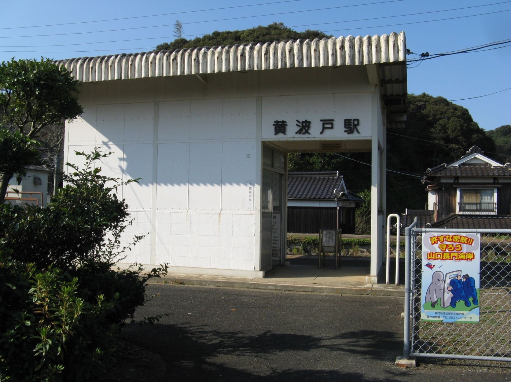 山陰本線黄波戸駅 駅舎 2009年10月16日 Bakkai撮影 Category:西日本旅客鉄道の鉄道駅画像 Category:長門市の画像